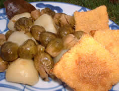 Petits panés aux choux de Bruxelles braisés (auteur : Avea) - Licence